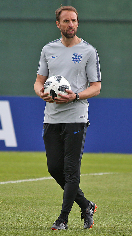 Каравай, самовар и сборная Англии. Кейн и компания готовятся к ЧМ-2018